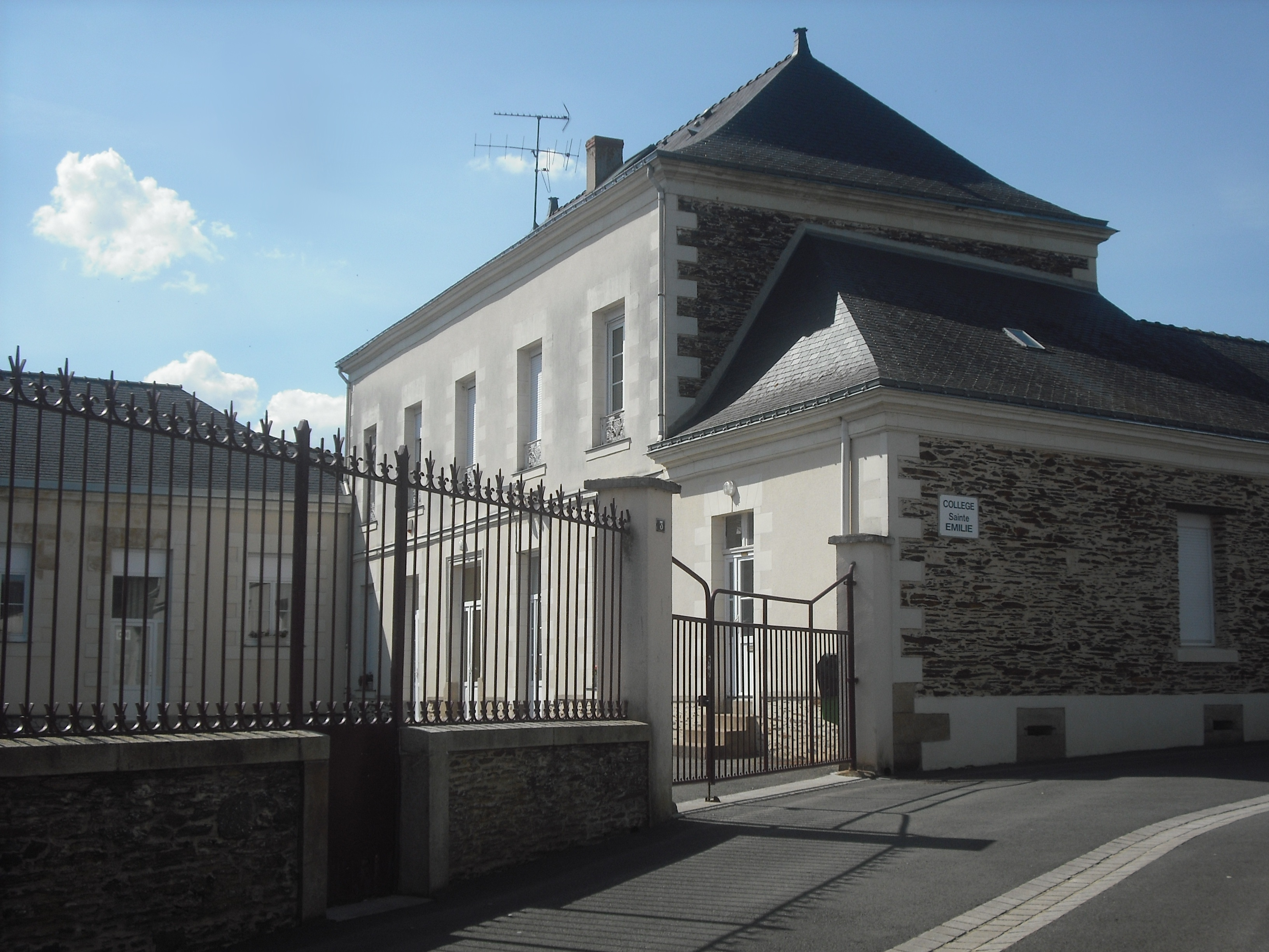 Collège Ste-Emilie, Candé, Maine-et-Loire, France.